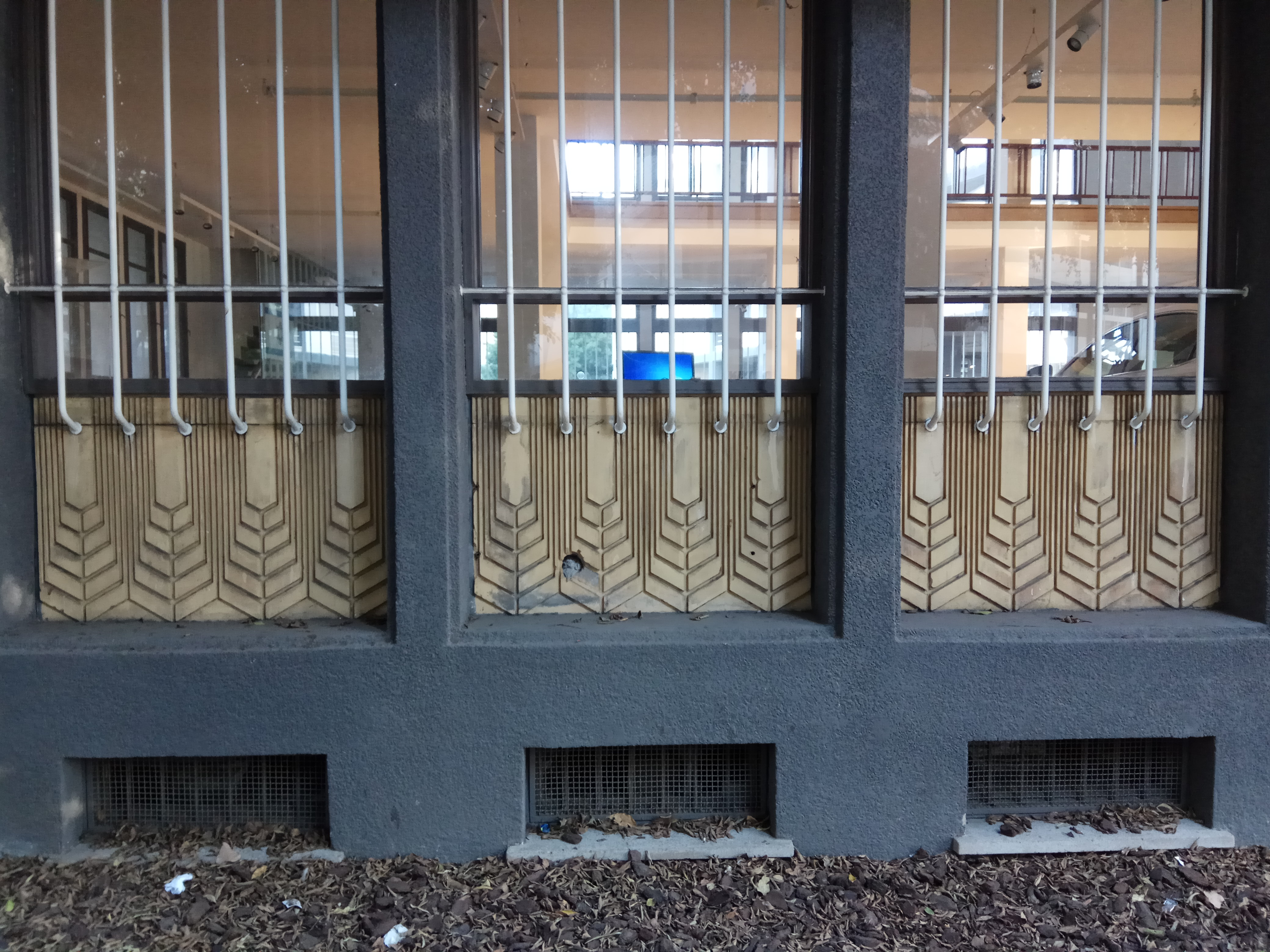 תבליטי שיבולים בבניין של הבנק לחקלאות לשעבר ברח' החשמונאים פינת קרליבך